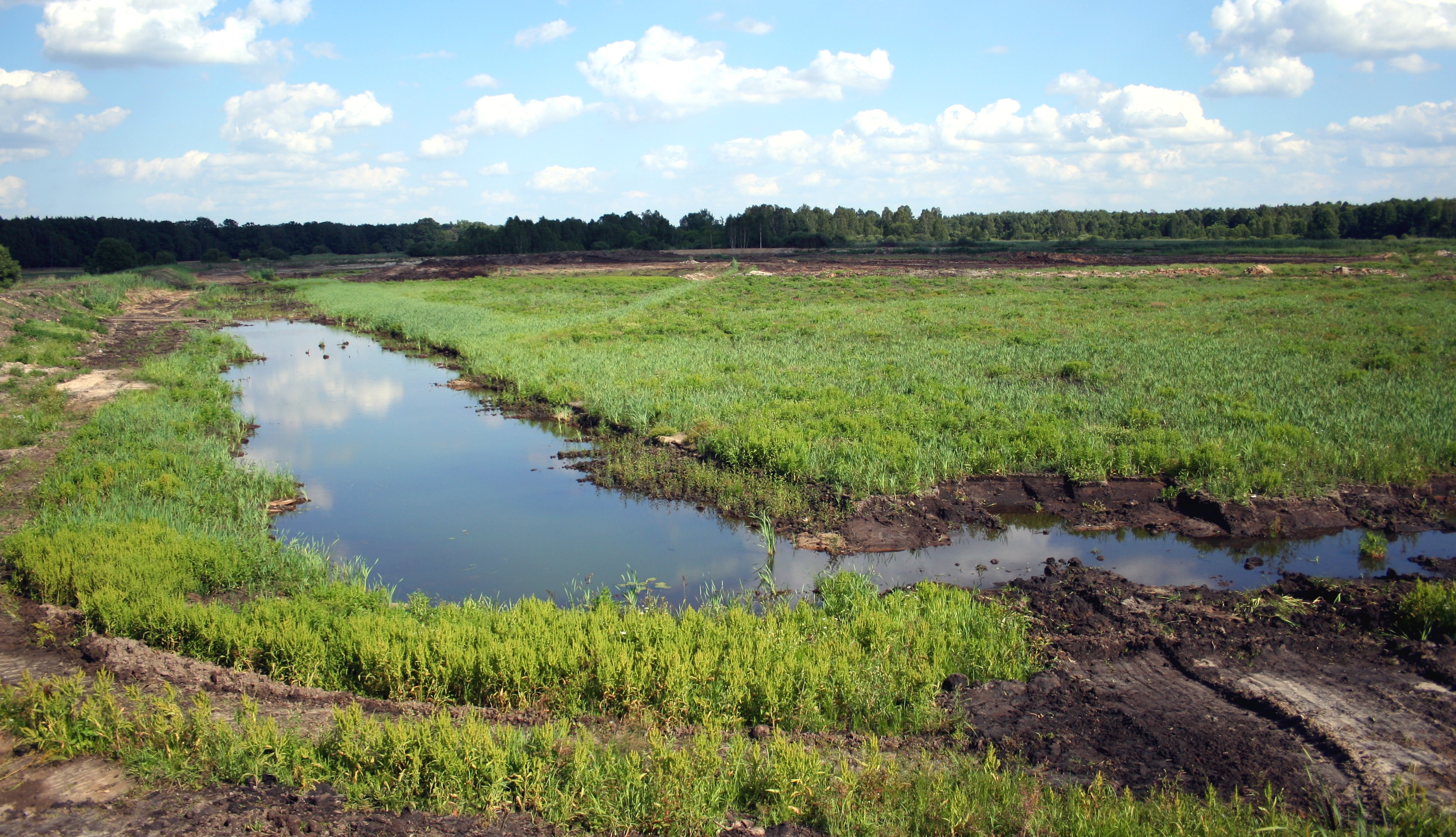 dno stawu hodowlanego w miejscowości Hadra, gmina herby, powiat lubliniecki